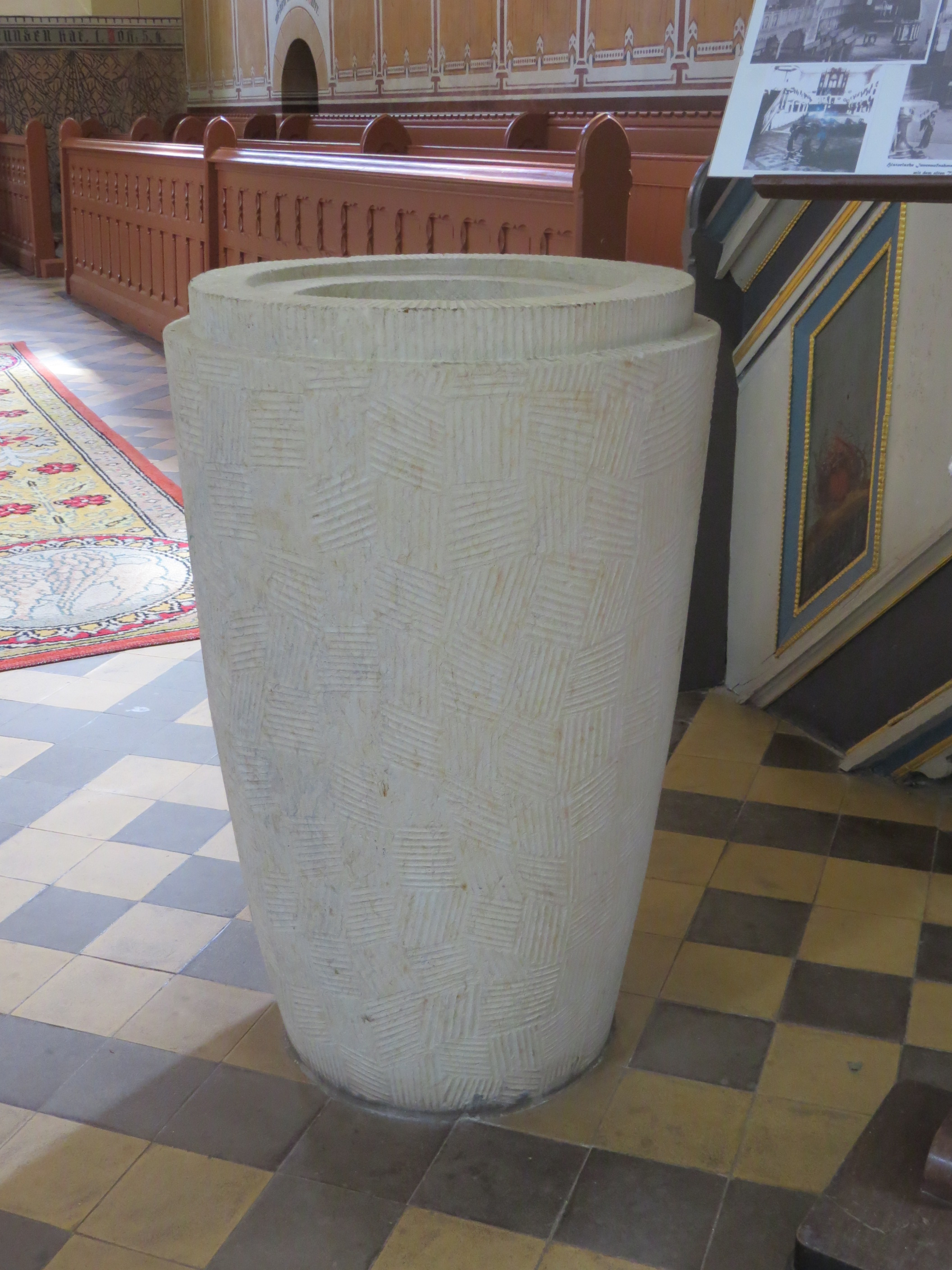 Inneres der ev. Kirche St. Johannes zu Lychen: Taufbecken aus dem 20. Jhd.